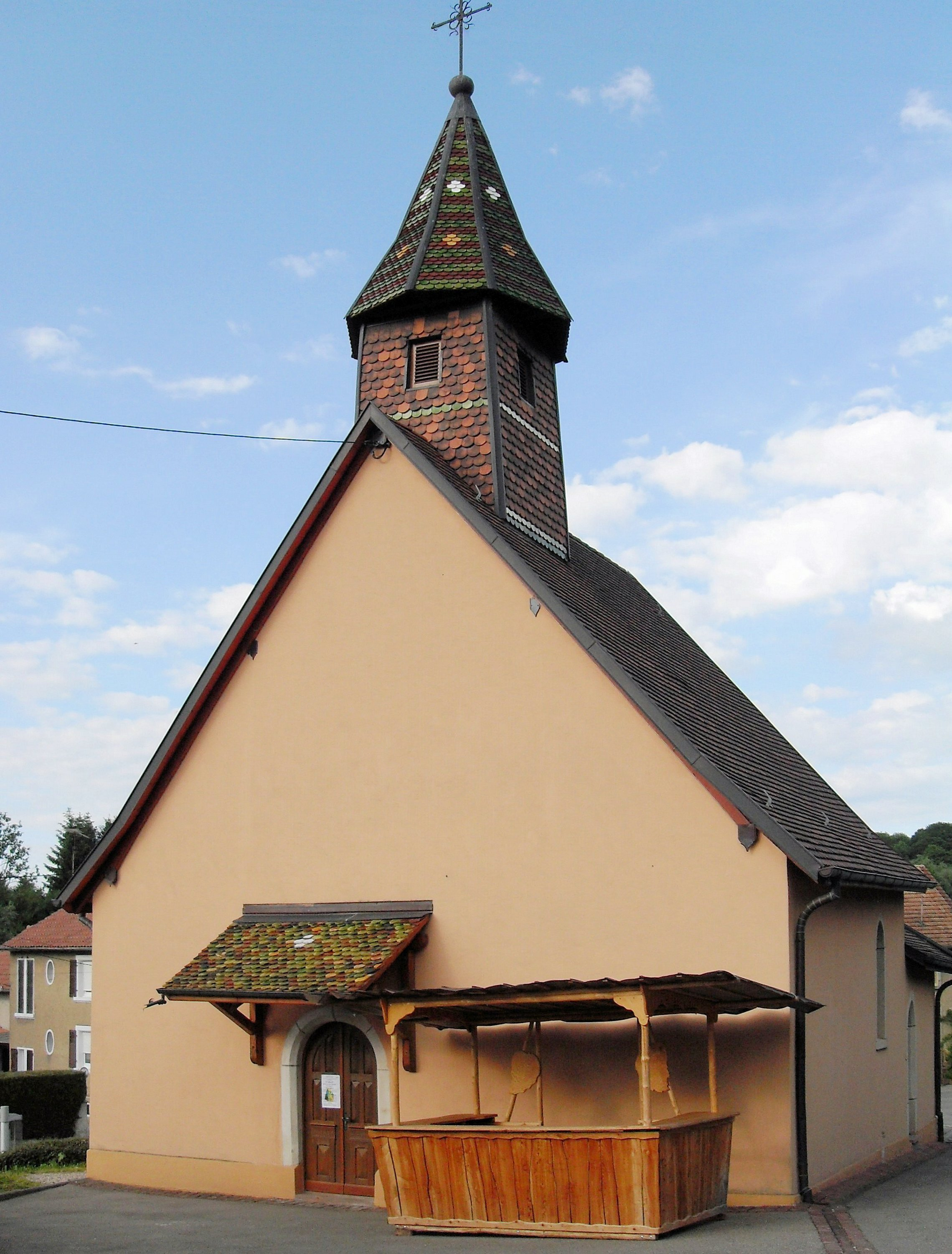 La chapelle Sainte-Croix à Seppois-le-Haut